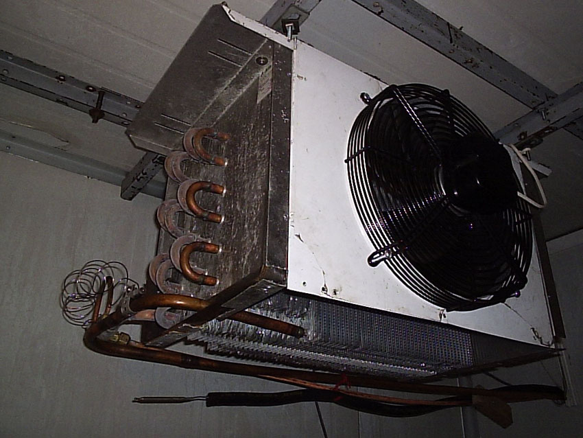 Evaporador aleteado de baja temperatura en cámara de talleres de montaje frigorífico. INACAP Santiago Chile.